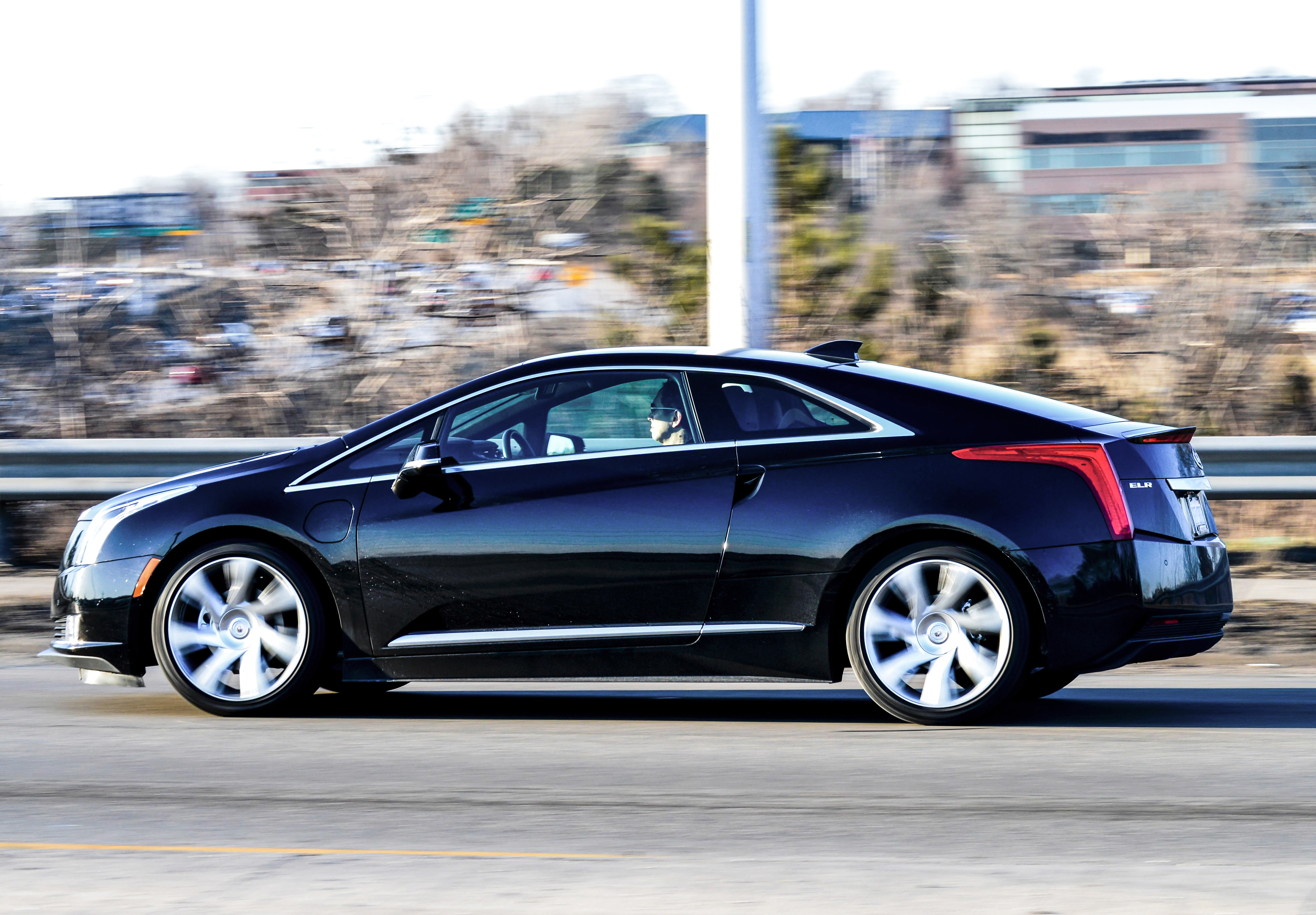 Cadillac ELR